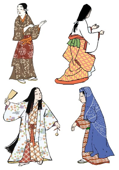 Kimono styles: "kosode", "koshimaki", "uchikake", "katsugi".